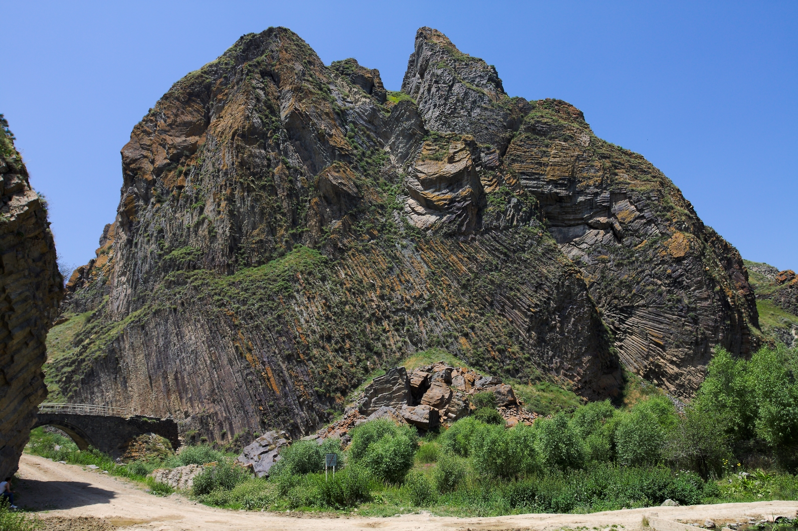 «Անանուն» սյունաձև բազալտներ, Որոտան գյուղի եզրին